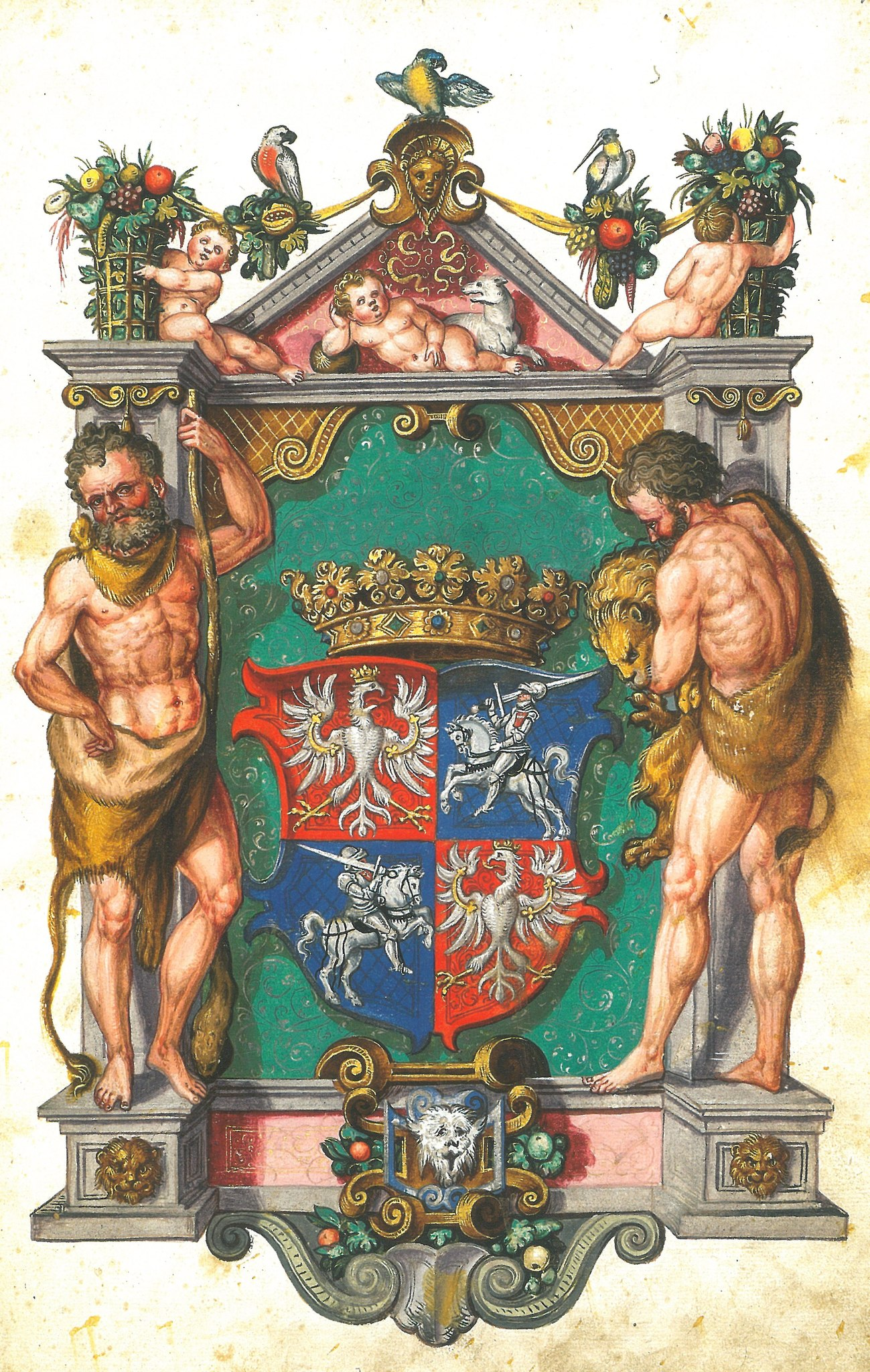 Беларуская (тарашкевіца): Герб вялікага князя літоўскага Жыгімонта Аўгуста (Žygimont Aŭgust) з «Пагоняй» («Pahonia»)